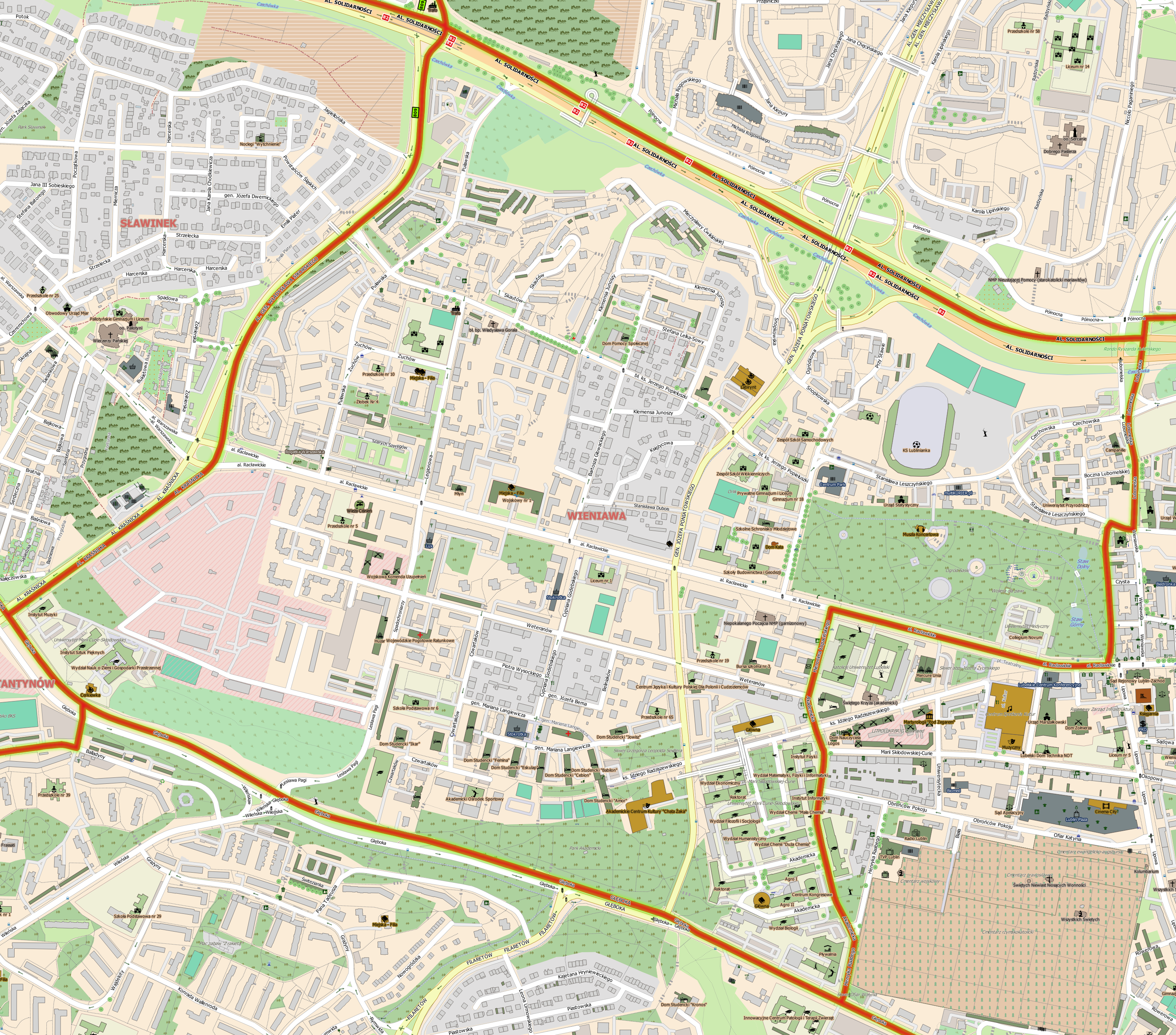 Plan dzielnicy Wieniawa w Lublinie.